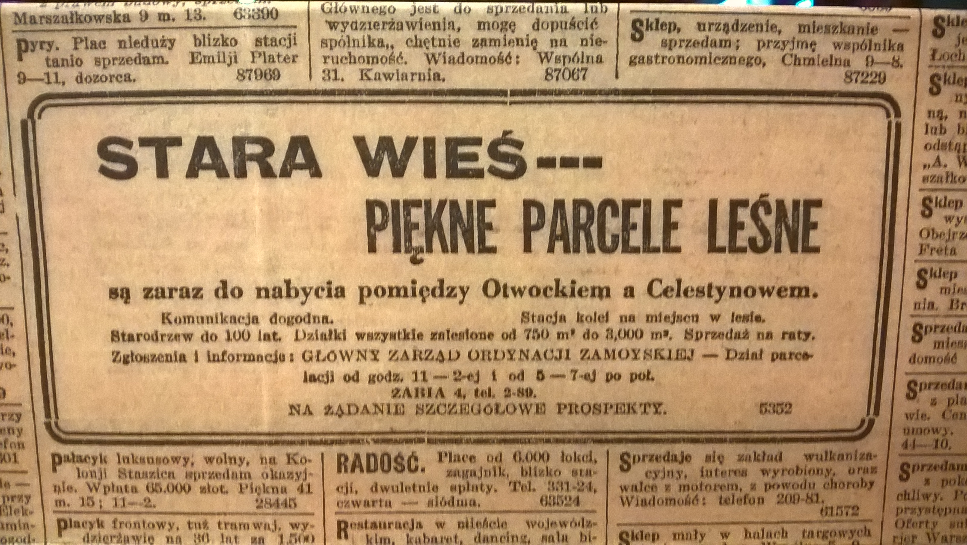 Ogłoszenie sprzedaży działek w Starej Wsi, Kurier Warszawski 1930